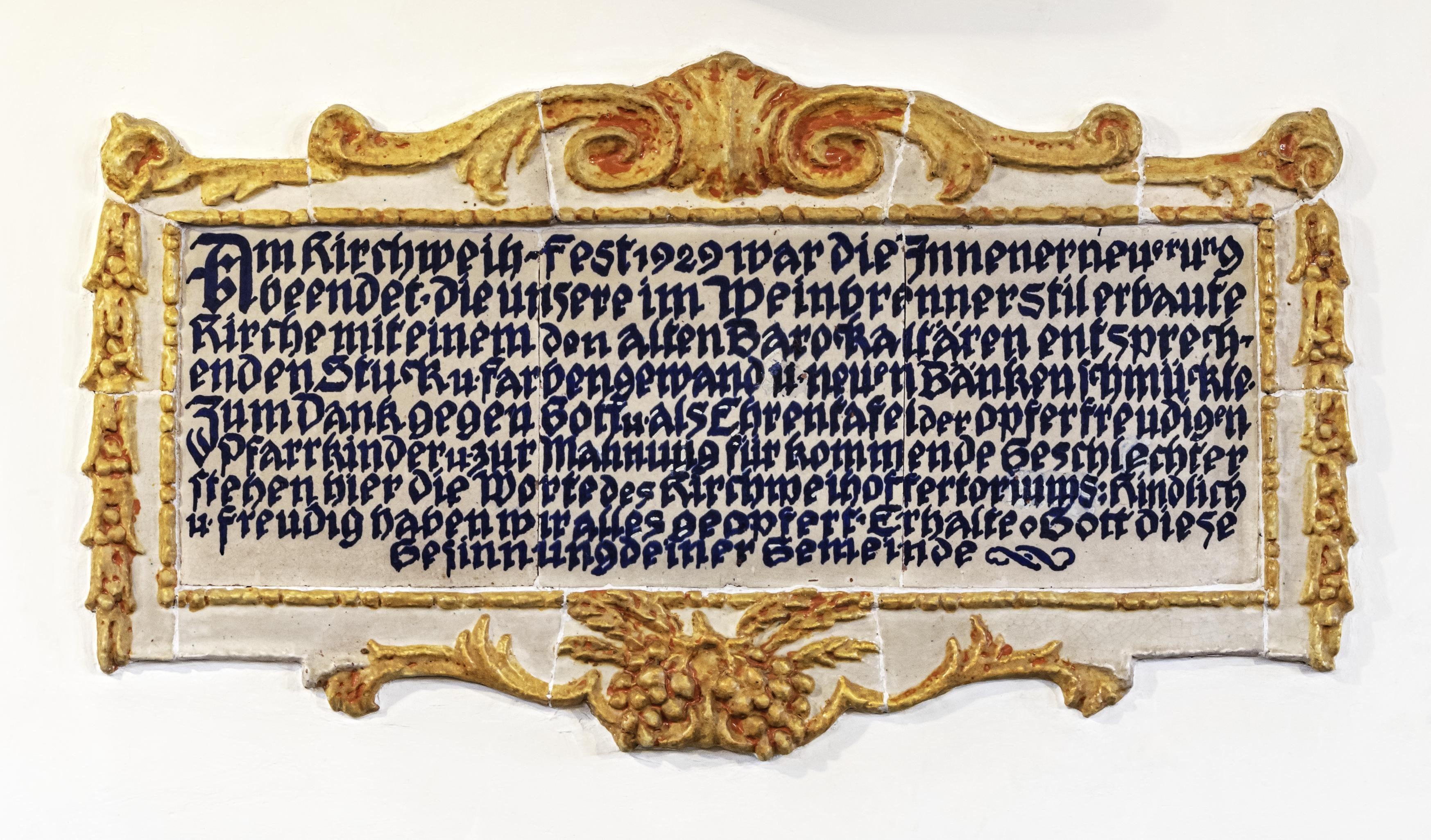 Die katholische Kirche St Petronilla in Kiechlinsbergen Die Tafel zur Erinnerung an die Renovierung 1929